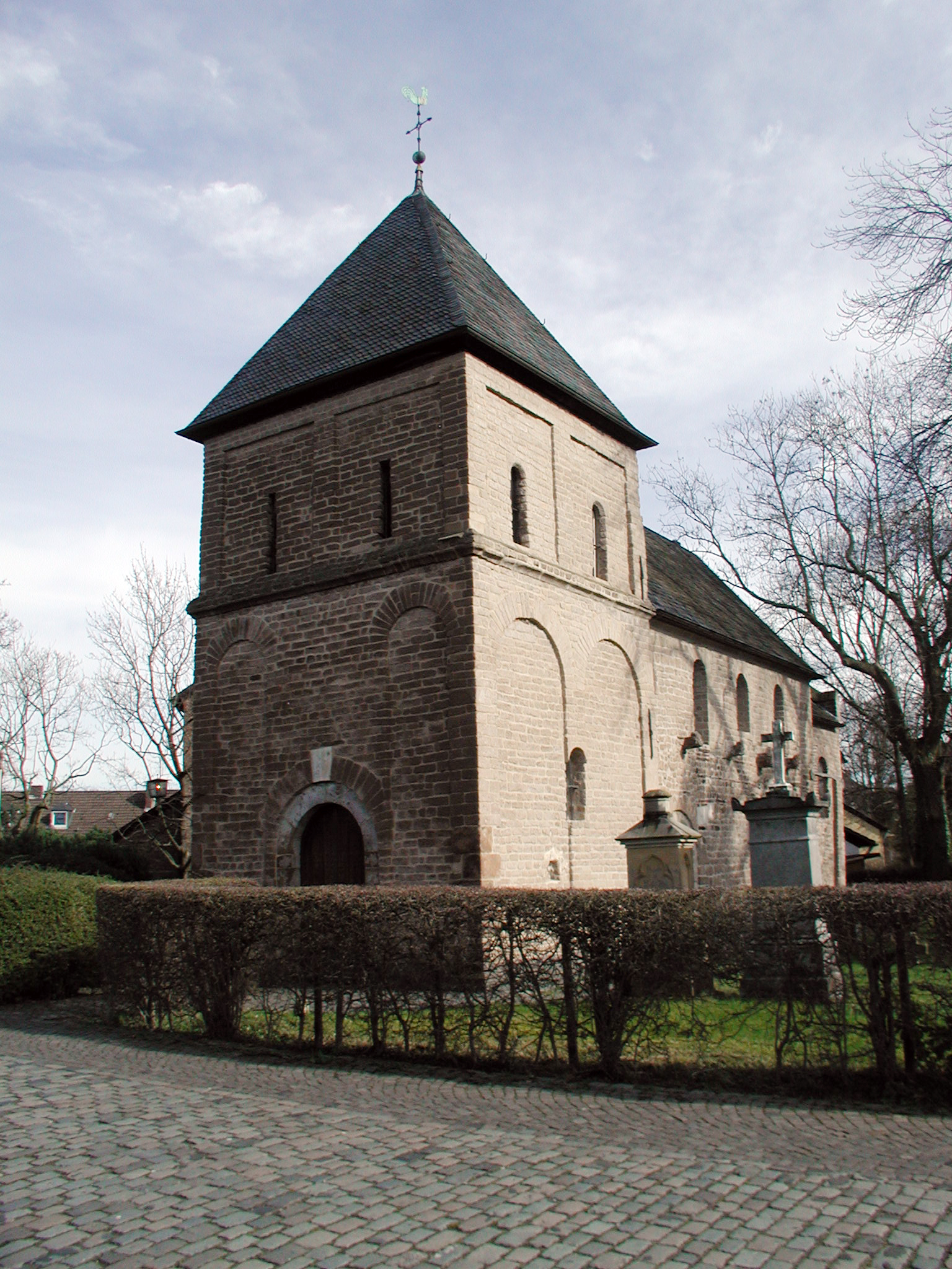 Köln-Lindenthal, Krieler Dömchen